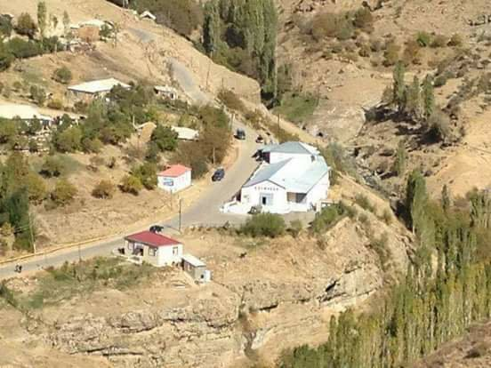 Keçili kəndində yeni salınmış yol